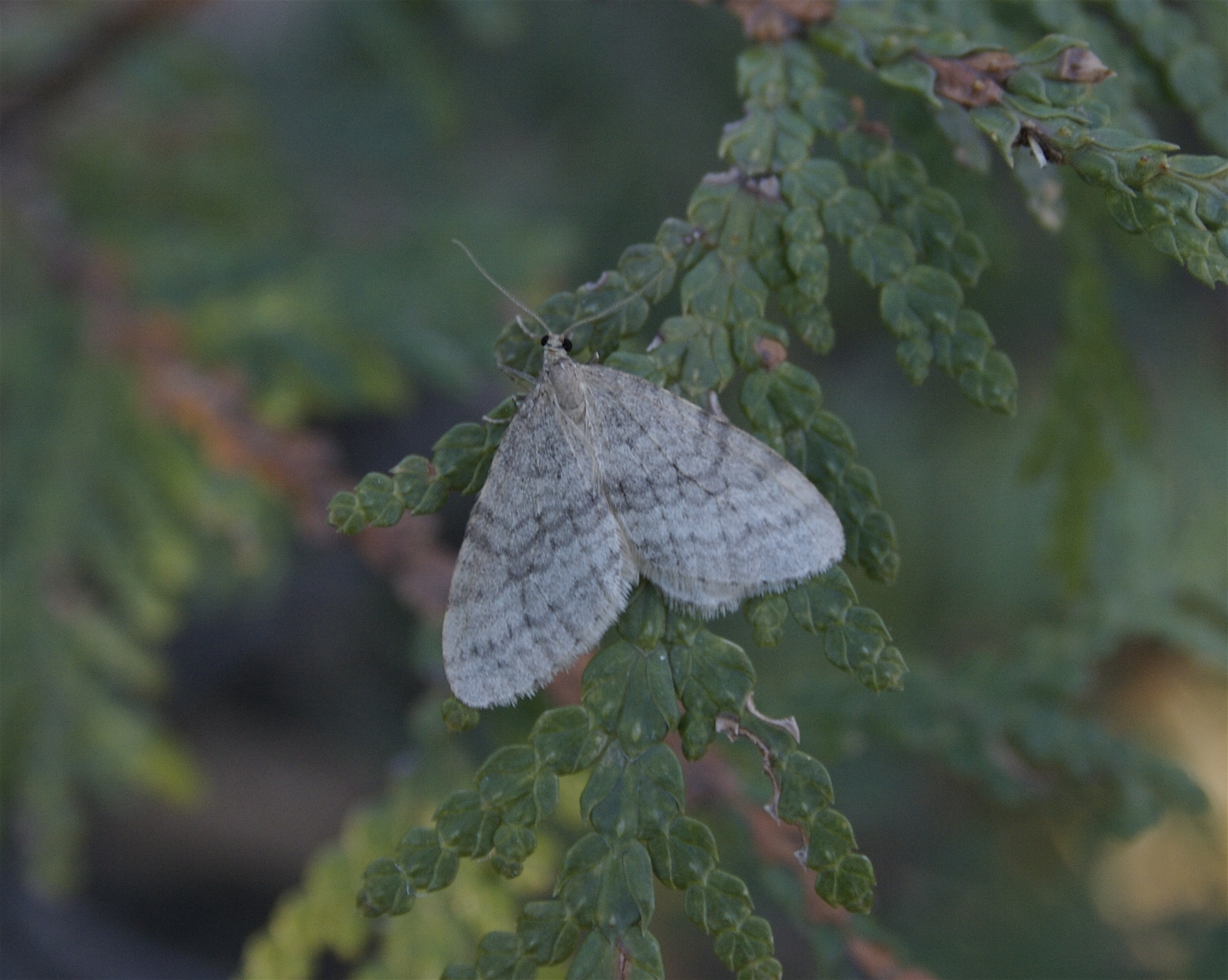 Bruce Spanworm (Operophtera bruceata) male